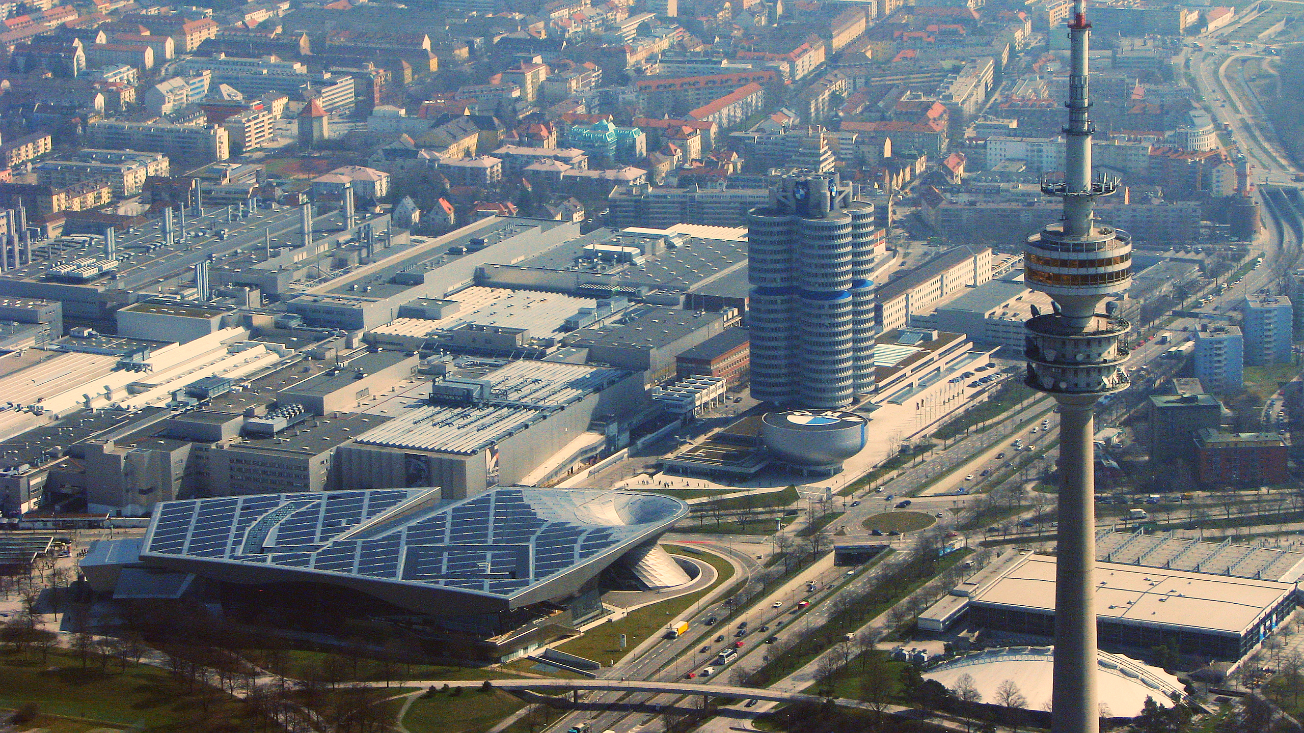 Luftbild München u.a. Olympiapark Eissportzentrum Olympiaturm Petuelring B2R Georg-Brauchle-Ring BMW - Bayern - Foto Wolfgang Pehlemann HSBD4381